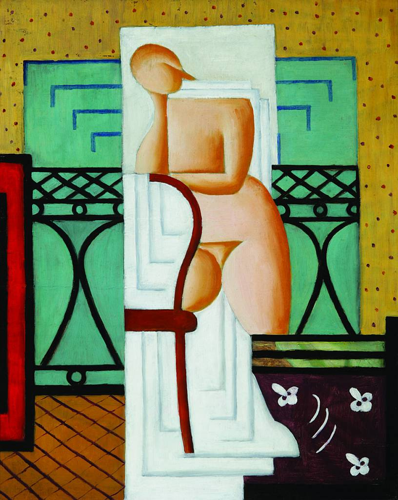 Akt